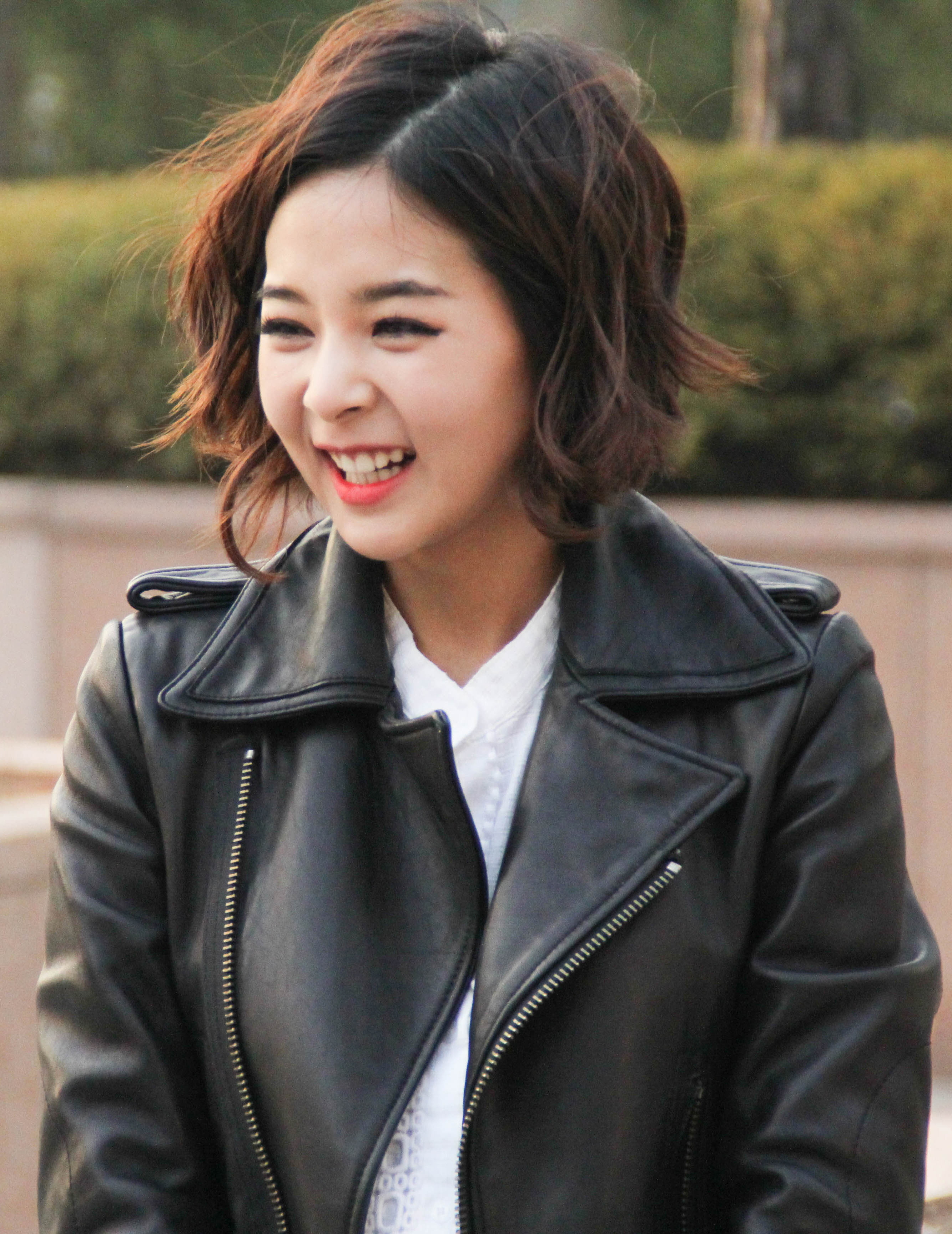 140315 김소정 팬미팅